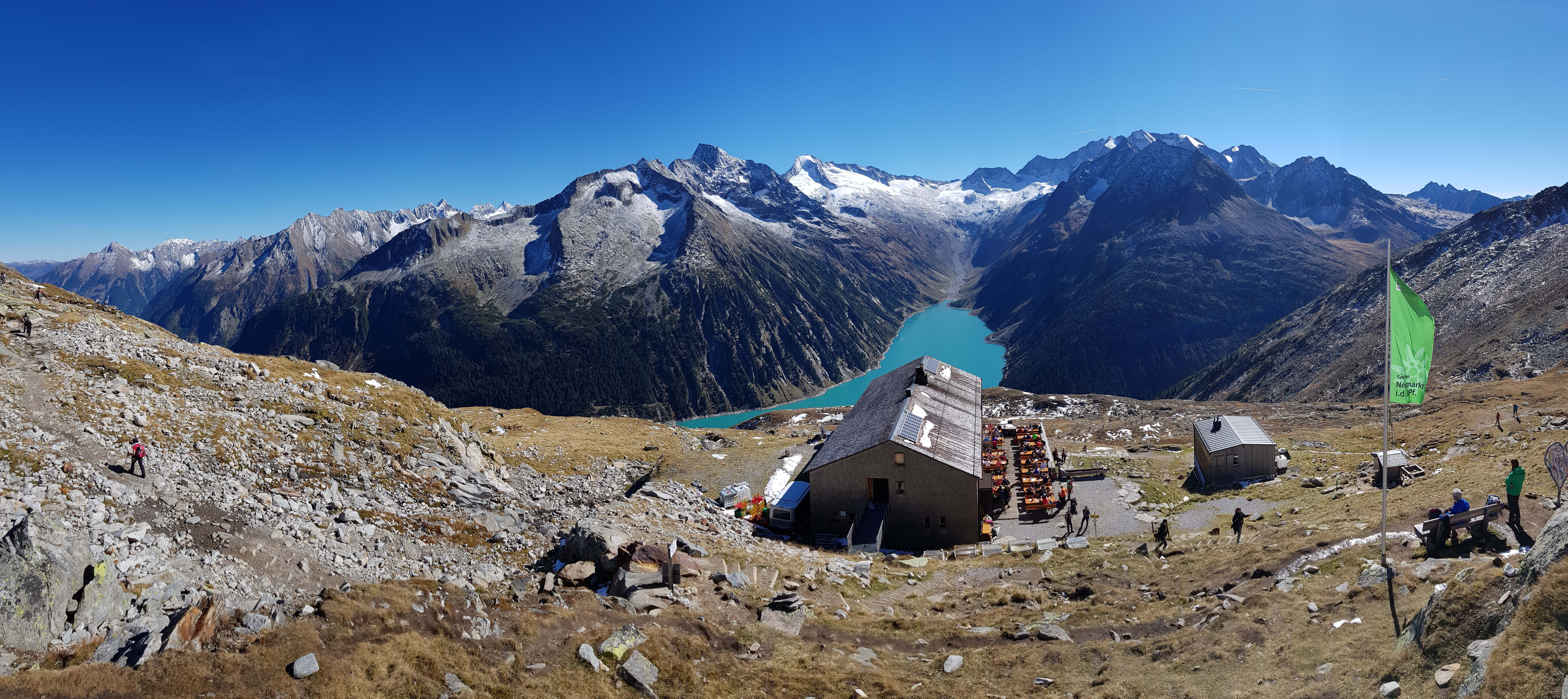 Olperer Hütte mit Schlegeisstausee